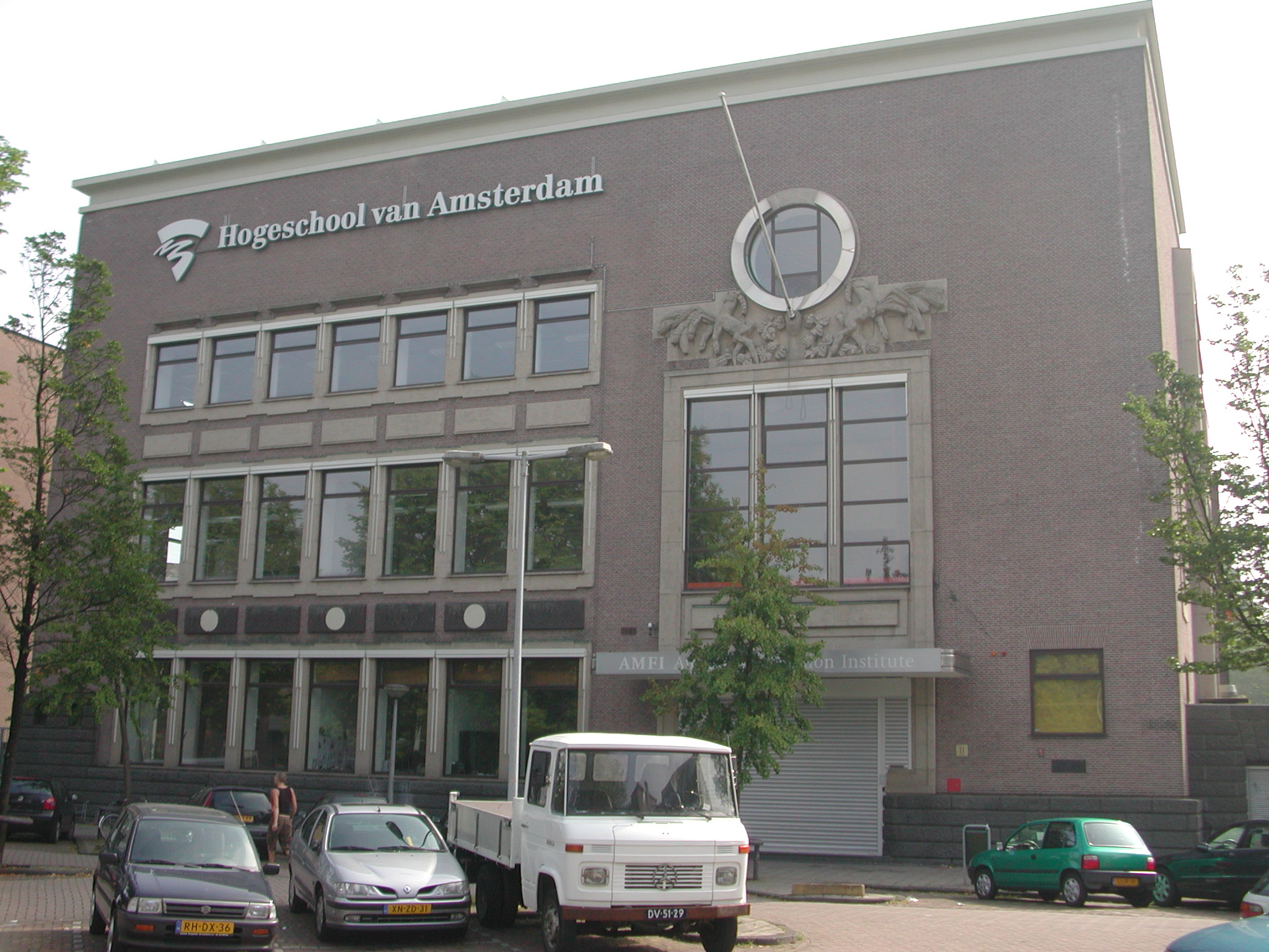 voormalig hoofdkantoor Amstelbrouwerij, Amsterdam